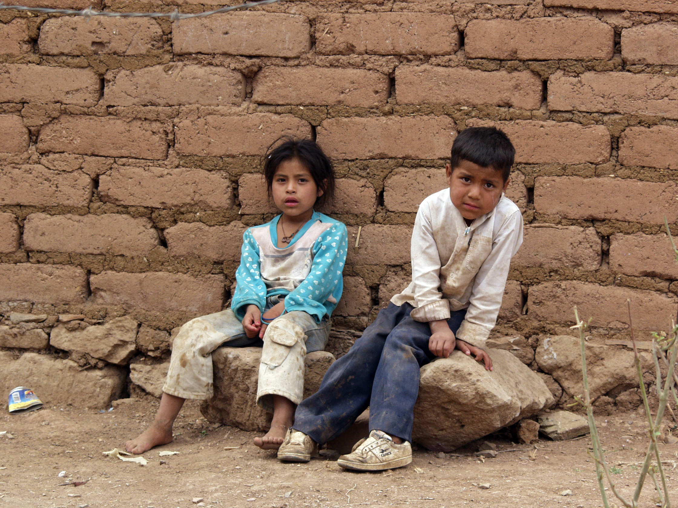 Niños pobres - pobres niños